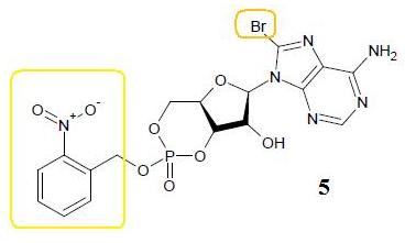 Joonis 7